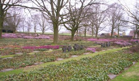 Duitse Militaire begraafplaats Hooglede